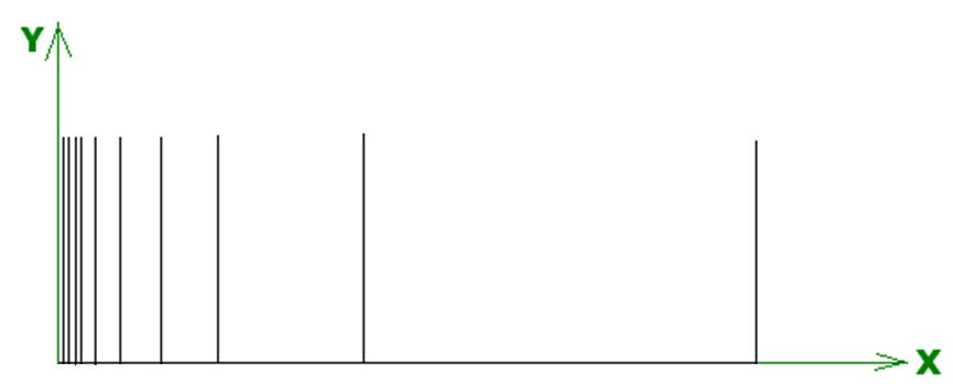 Conjunto del peine (es conexo pero no conexo por caminos)